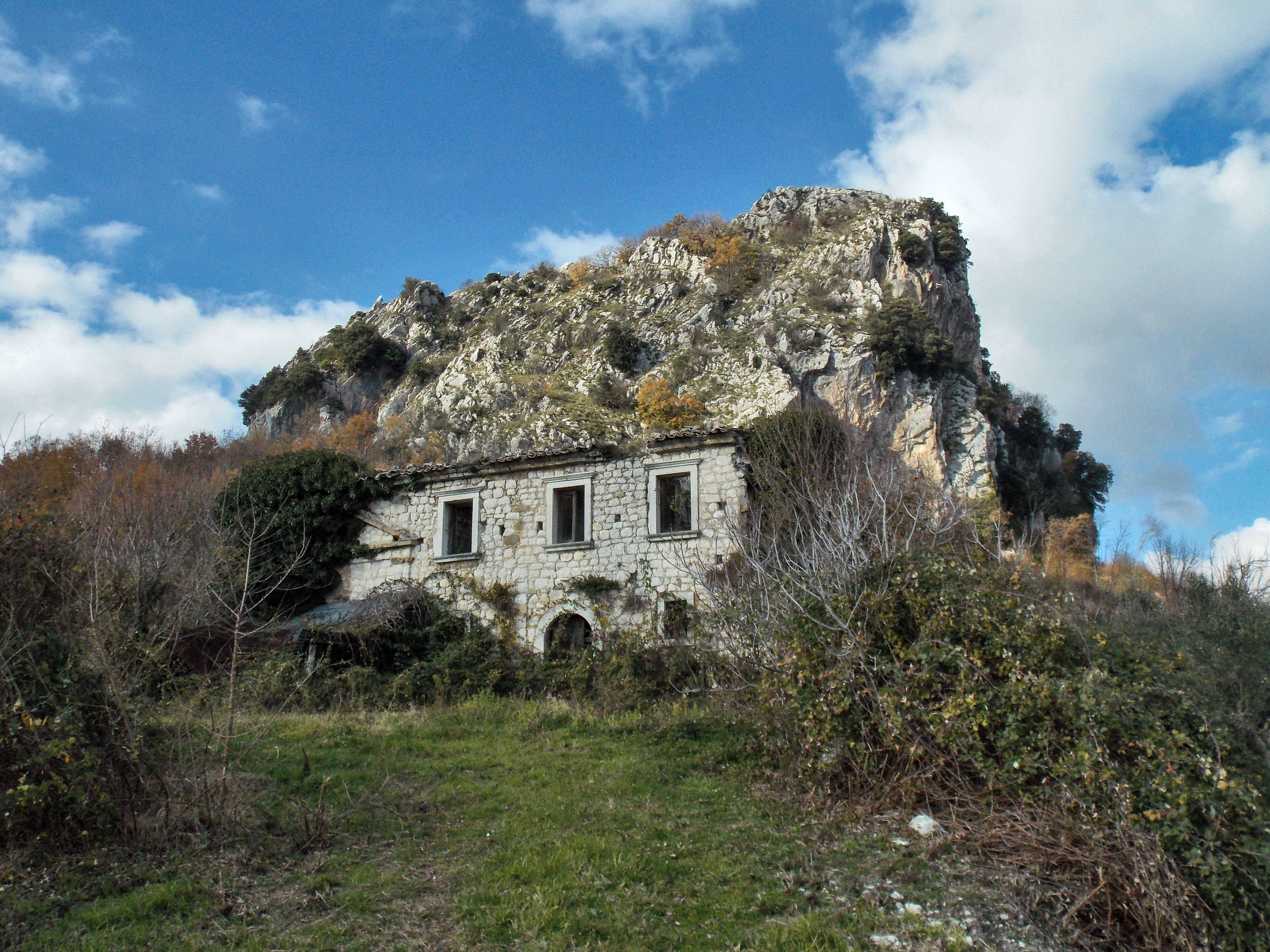 La Pietra di Tocco di Tocco Caudio (BN) con la cappella in ruderi di San Michele annessa ad una masseria